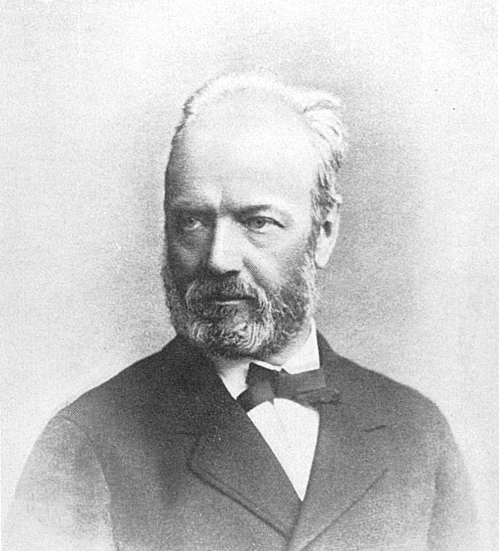 Rumantsch: Purtret da Simon Caratsch (1826–1892)